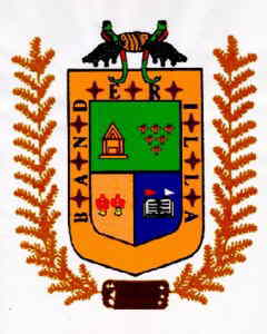 Escudo de Banderilla, Veracruz, México